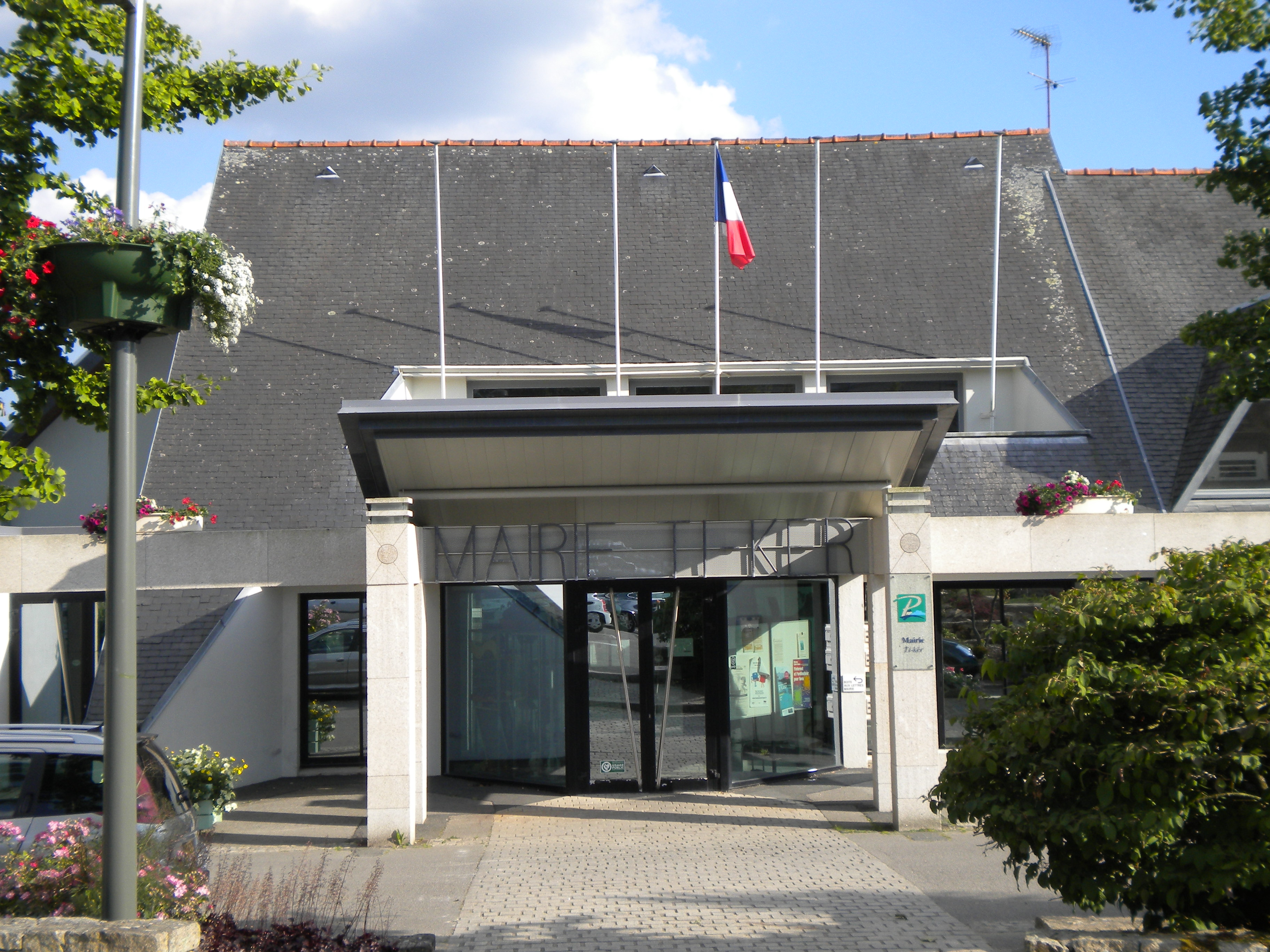 Ti-kêr Ploveilh, Bro Gerne, Breizh.